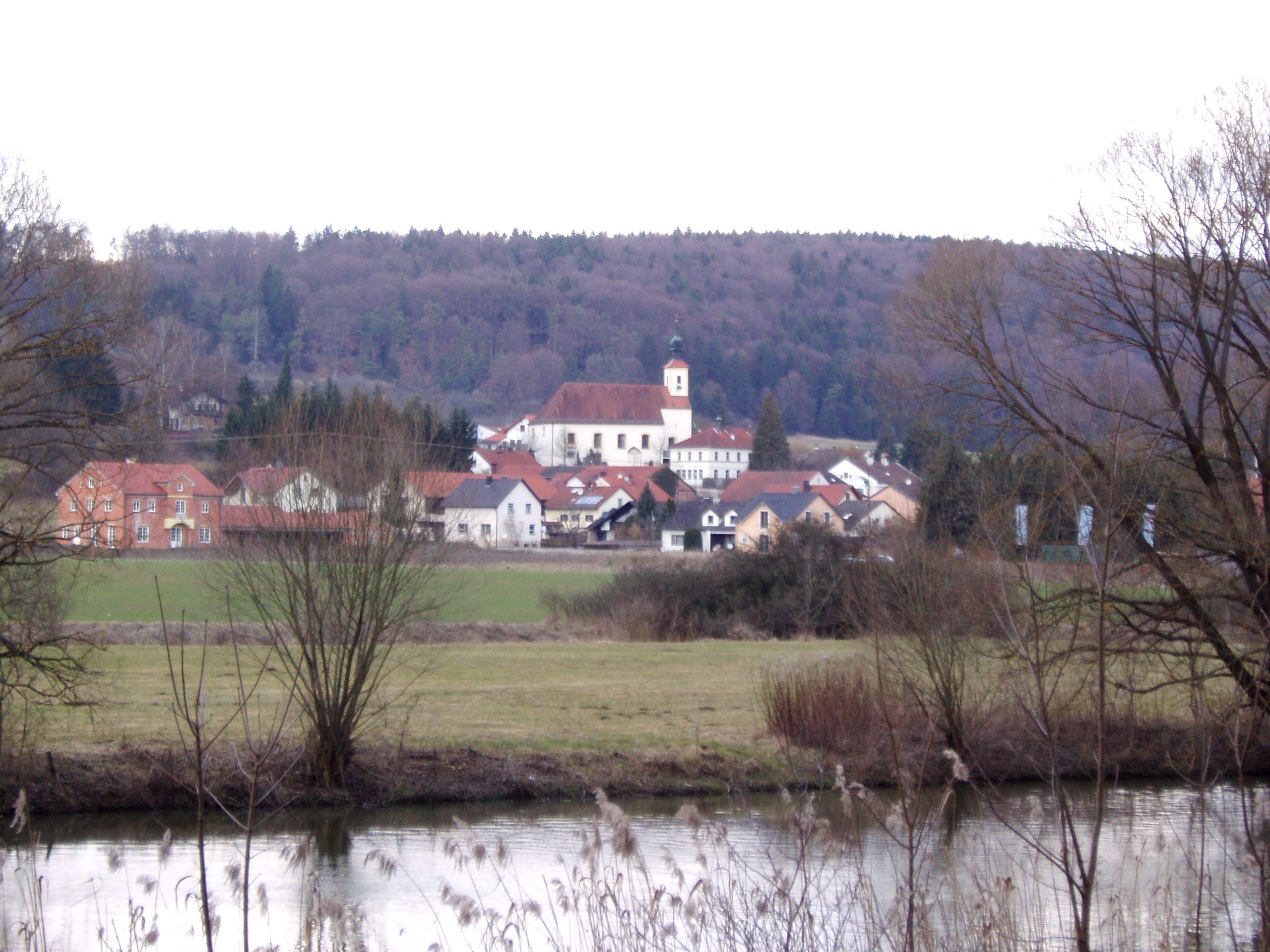 Walting_an_der_Altmühl,_Landkreis_Eichstätt